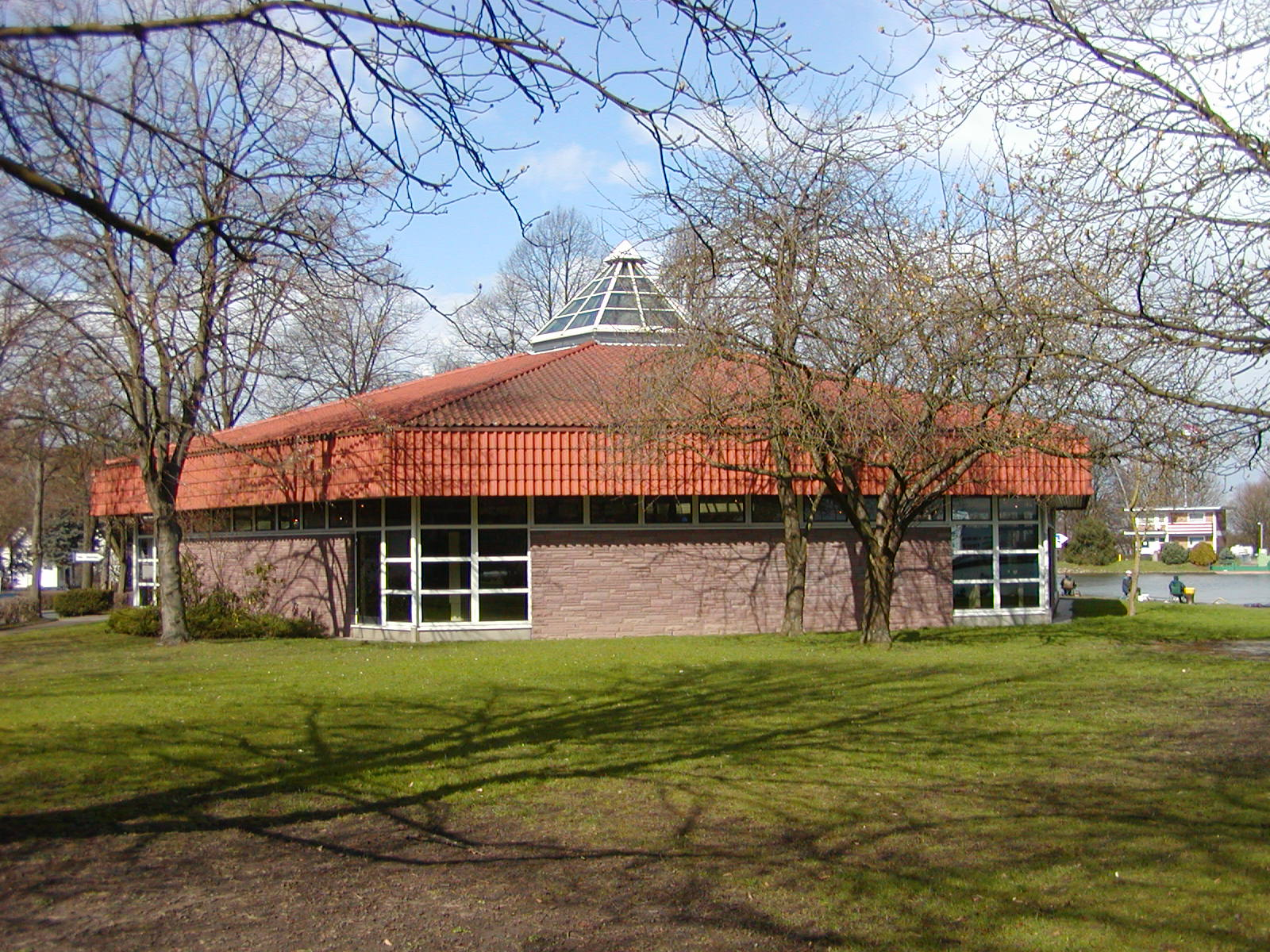 Das Informationszentrum am Mittellandkanal in Minden, Nordrhein-Westfalen. Das Zentrum informiert Besucher über das Wasserstraßenkreuz Minden, in dem sich der Mittellandkanal und die Weser kreuzen.